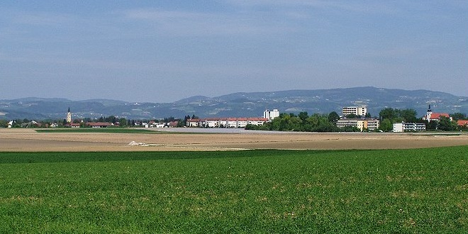 Blick auf Alkoven